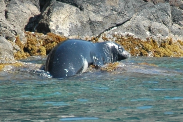 Phoque-Moine Monachus Monachus Phoque Moine s'installant sur un rocher d'un îlot proche de l'ile de Sérifos dans les Cyclades